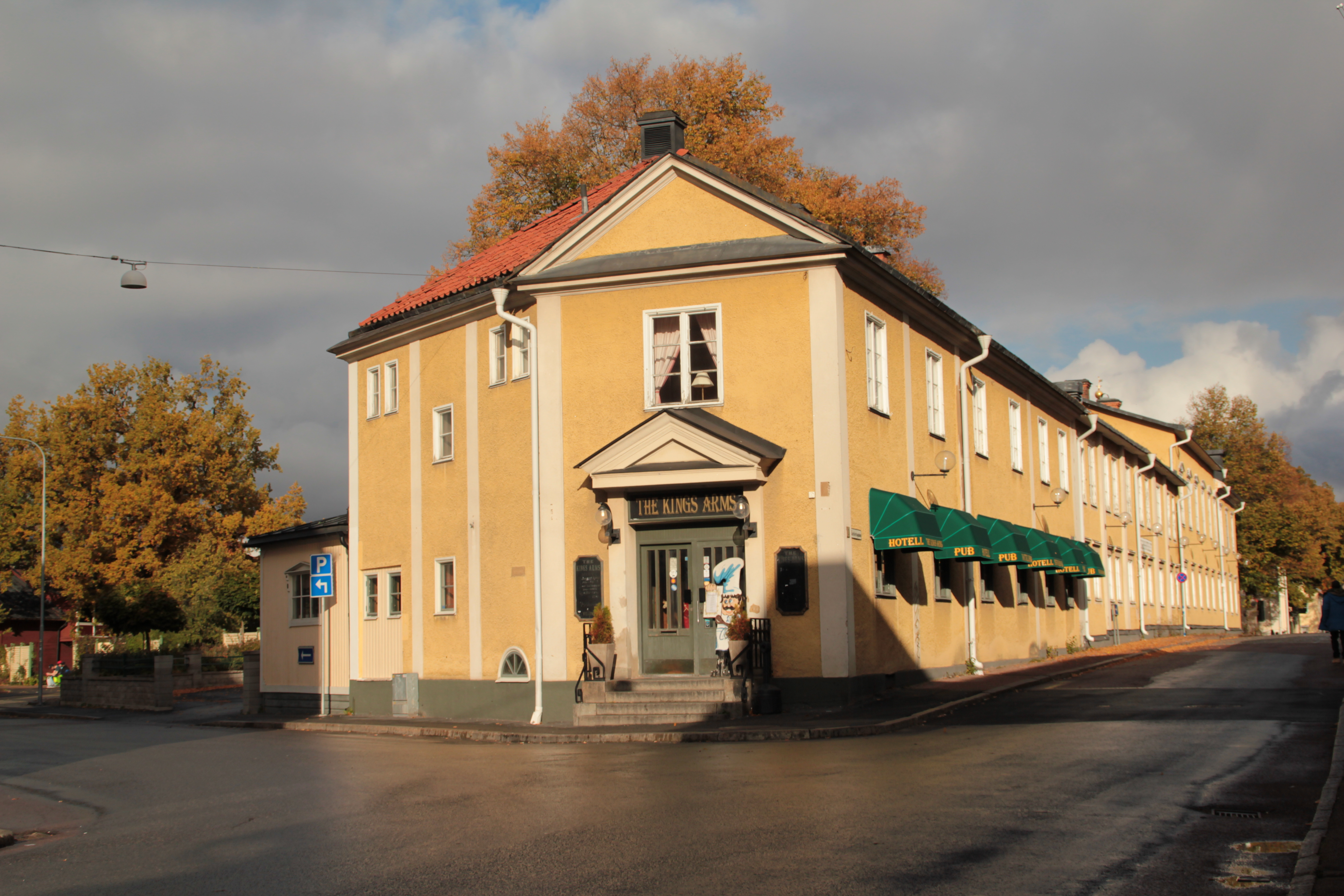 Stadshotellet med puben Kings Arms, Hedemora, Sverige. Apoteksparken skymtar t.v.